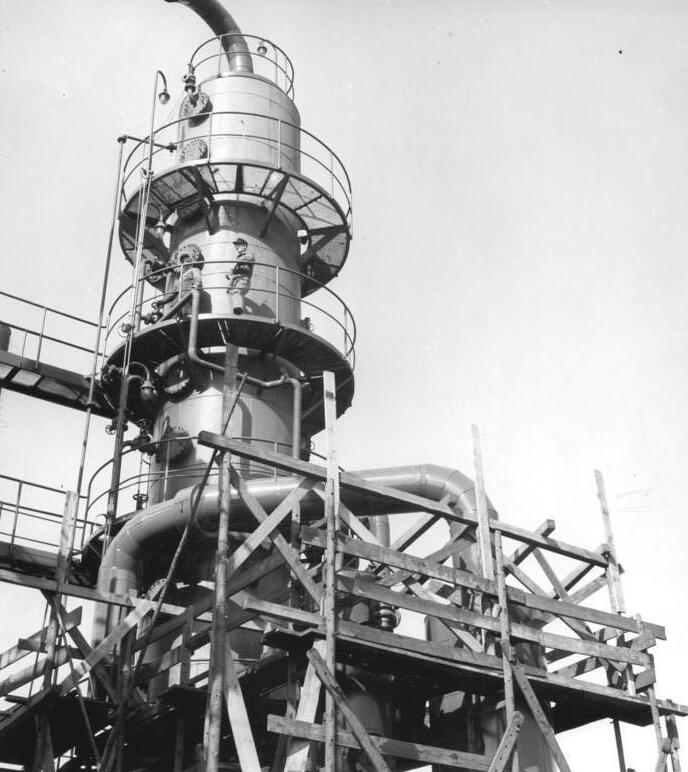 Zentralbild-Schaar Qua-Noa 19.9.1959 10 Jahre DDR - Braunkohlenkombinat Espenhain. UBz: 34 Tage vorfristig fertiggestellt und im August in Betrieb genommen wurde eine neue Erdölverarbeitungsanlage, die im Jahr 150 000 to verarbeitet.